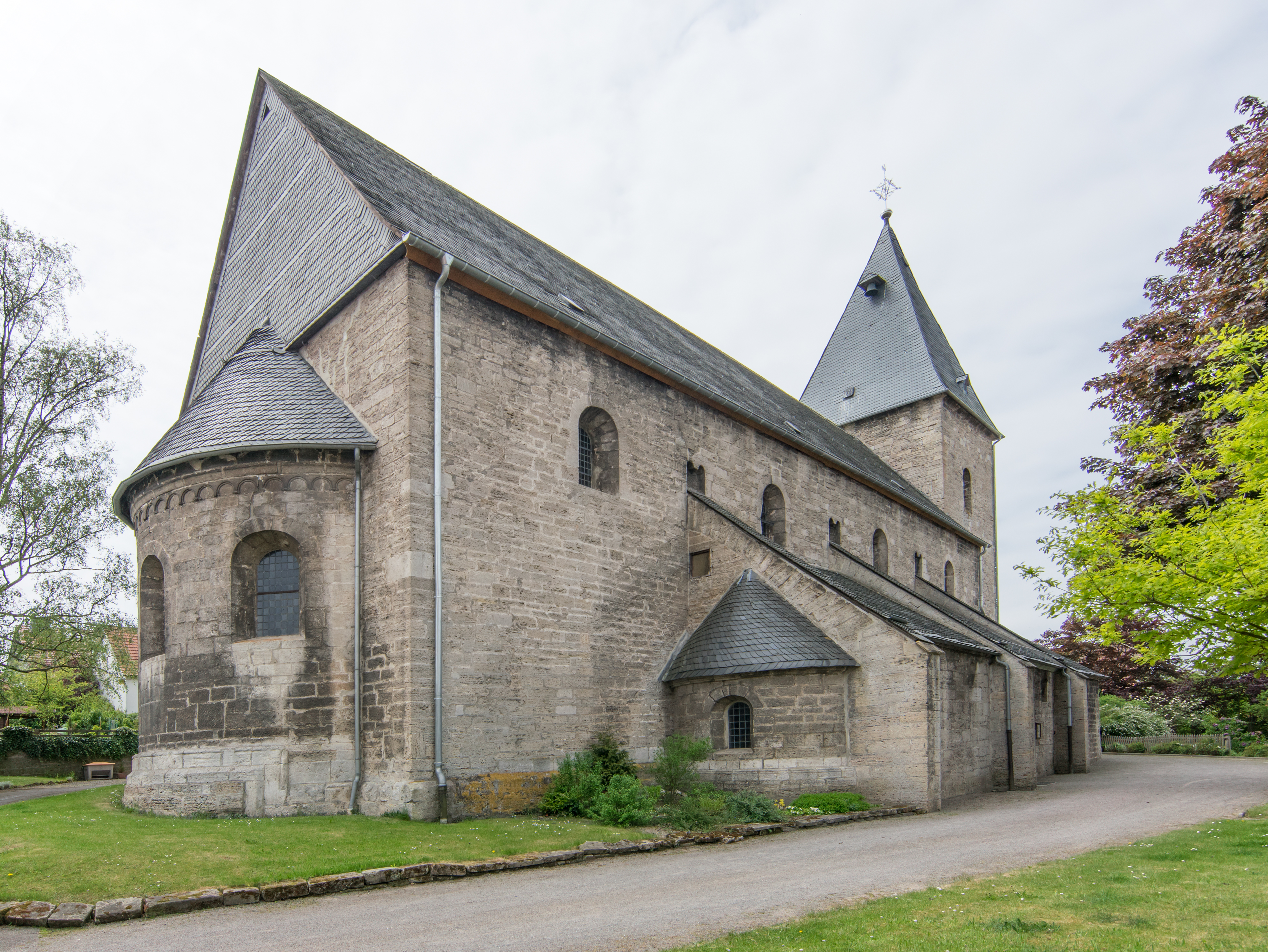 Adorf St. Johannis von Nordosten